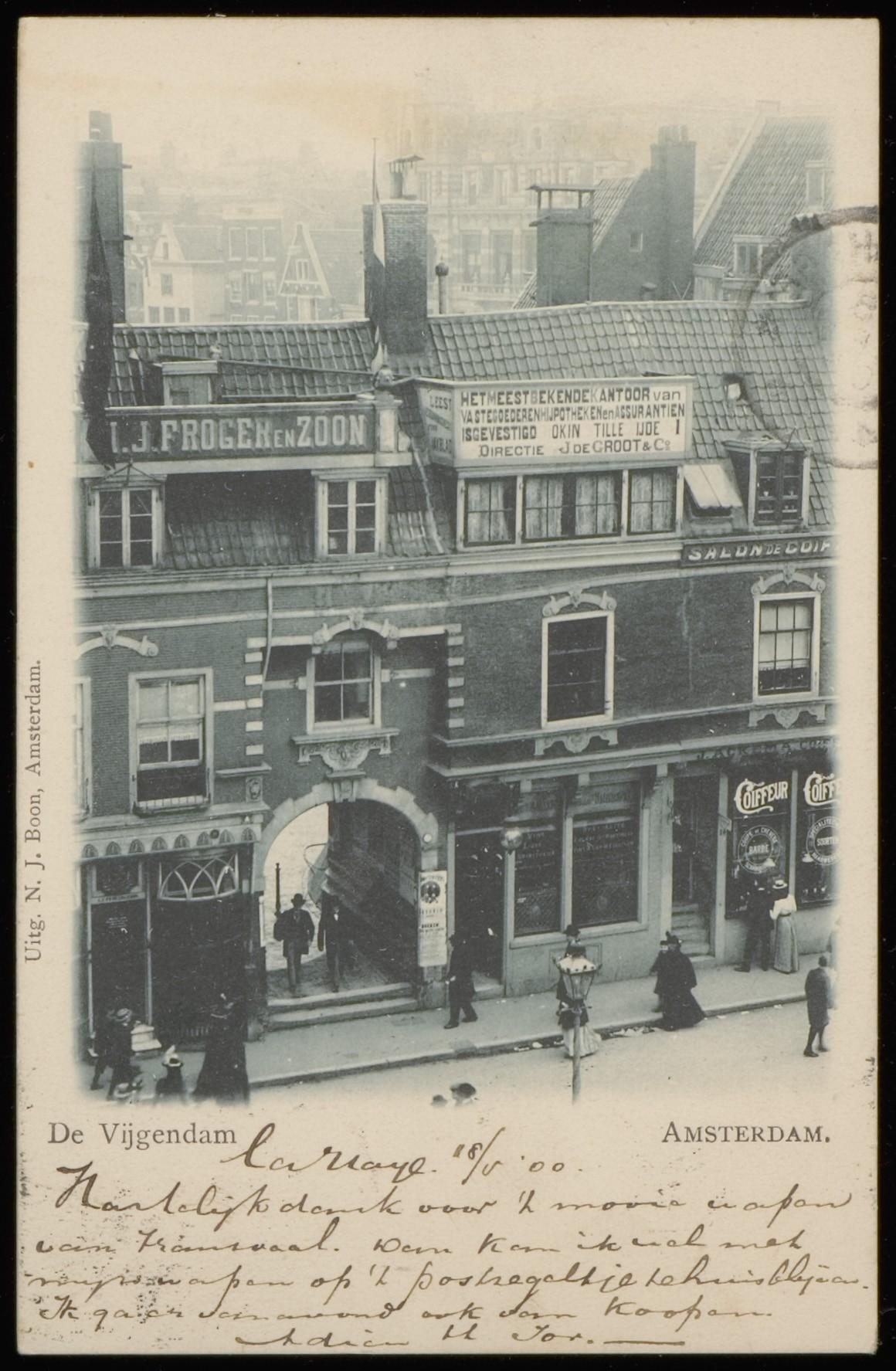 Beschrijving Vijgendam met Beurspoortje met op de achtergrond het Rokin. Uitgave N.J. Boon, AmsterdamDocumenttype prentbriefkaartVervaardiger Boon, N.J. (uitgever)Collectie Collectie Stadsarchief Amsterdam: prentbriefkaartenDatering 1900 ca.Geografische naam VijgendamInventarissen PBKD00396000003 Generated with Dememorixer